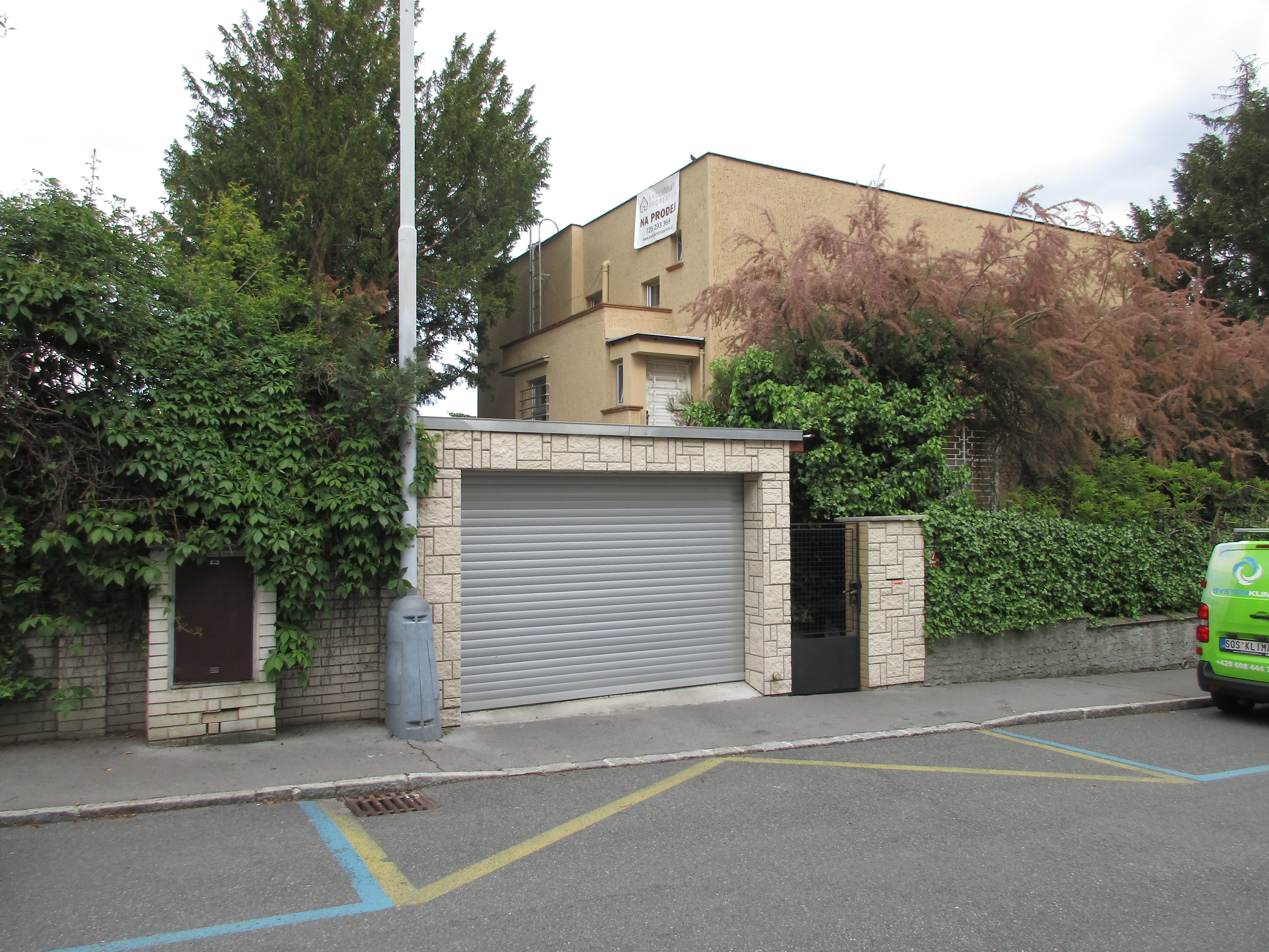 Filmařská 417/18, Praha 5-Hlubočepy